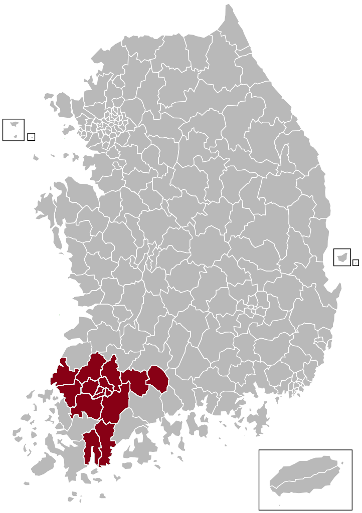 광주우편집중국 관할구역 지도